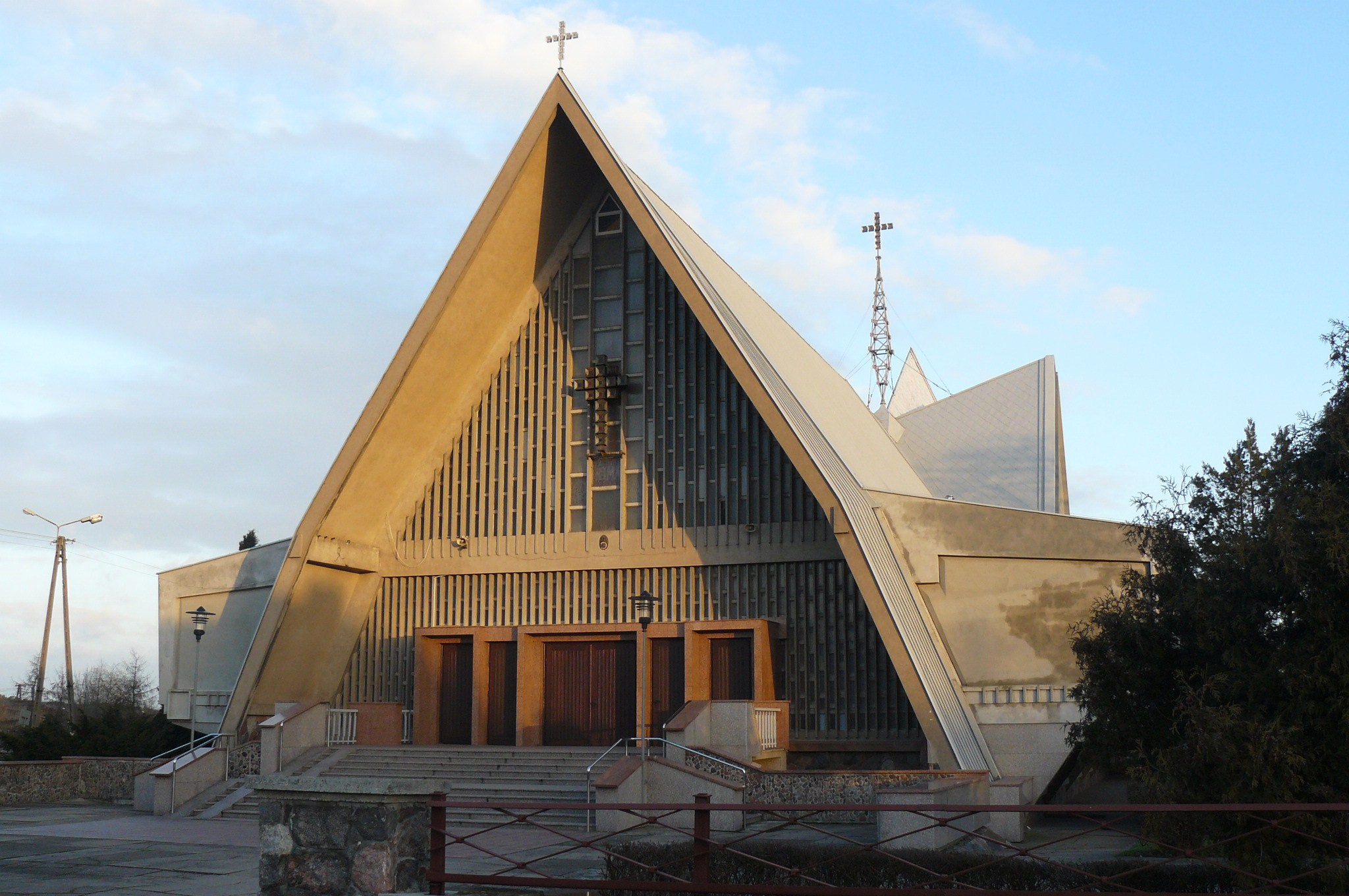 Kościół NMP Matki Kościoła w Gostyninie.